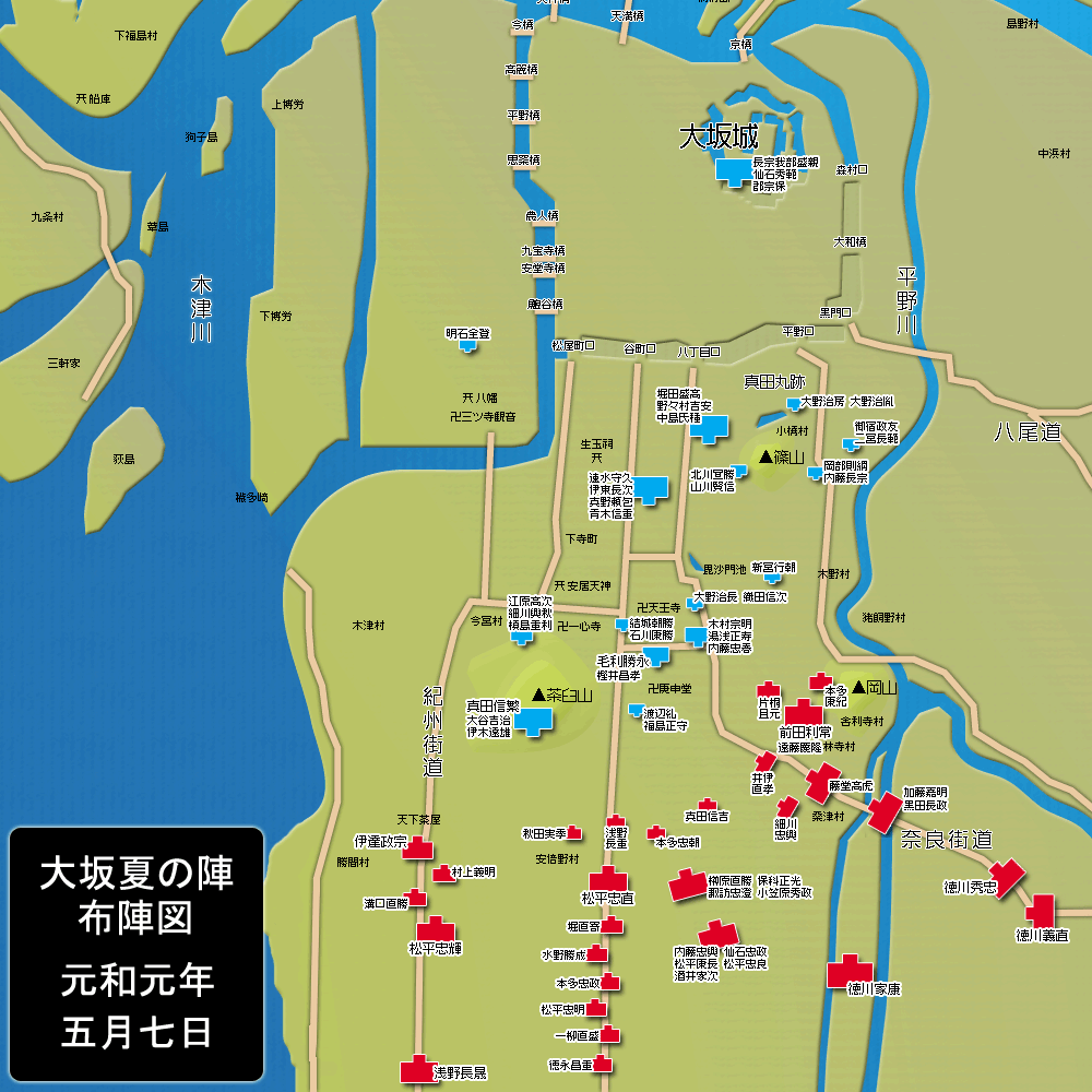 大坂夏の陣（天王寺・岡山合戦）布陣図。投稿者Jmho 2006年10月31日 (火) 19:11 (UTC)が作成。